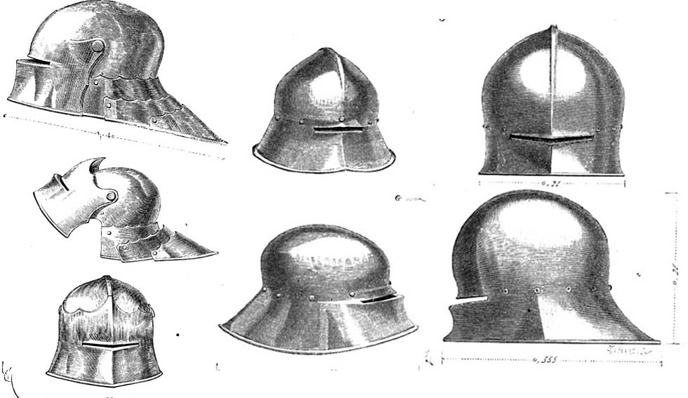 Sallets by Eugène Emmanuel Viollet-le-Duc